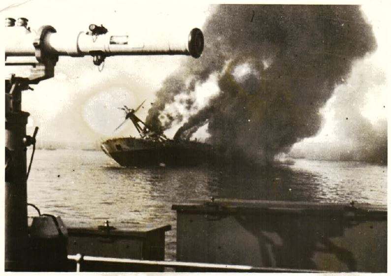 la nave da battaglia francese Bretagne affonda